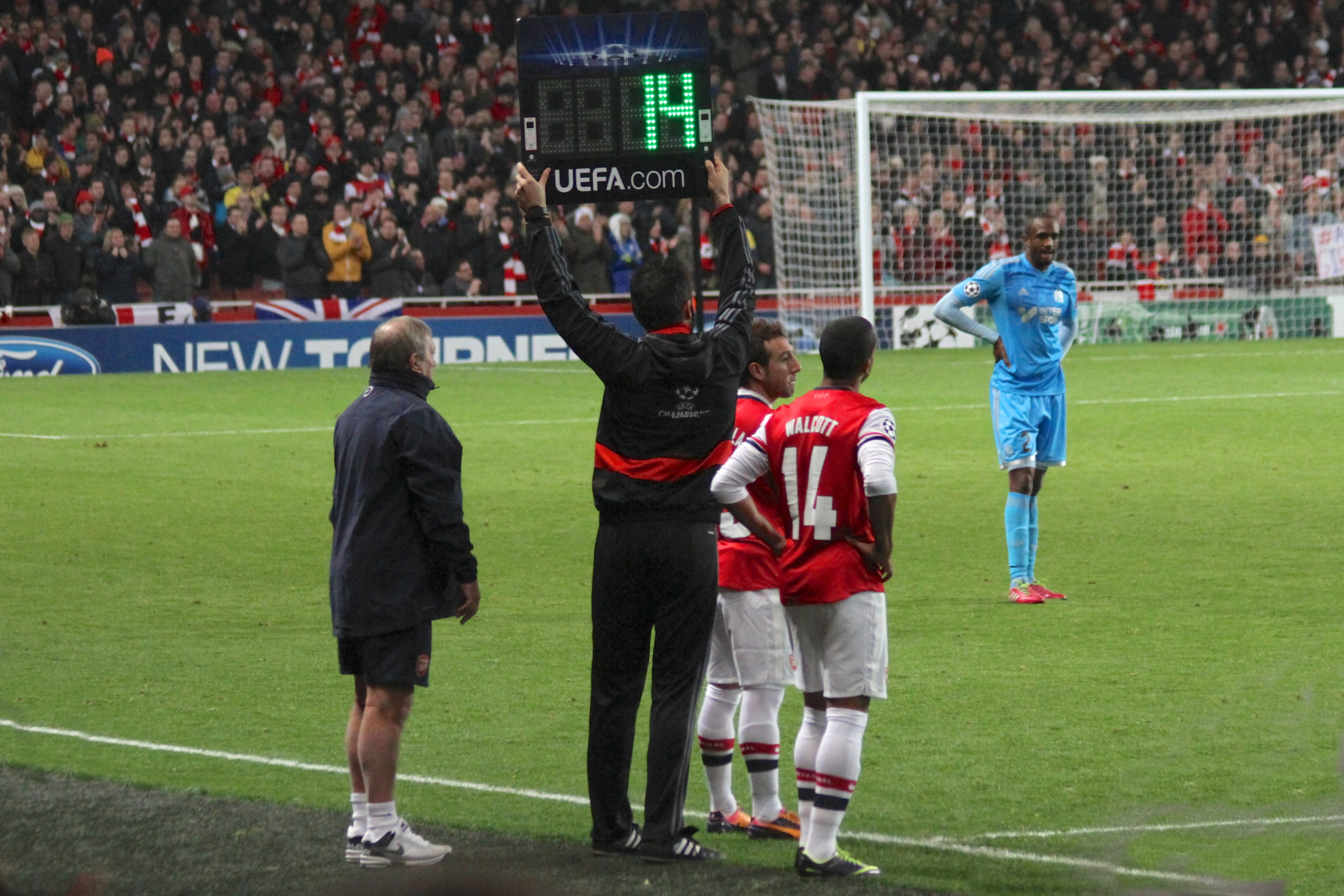 Cazorola and Walcott come on